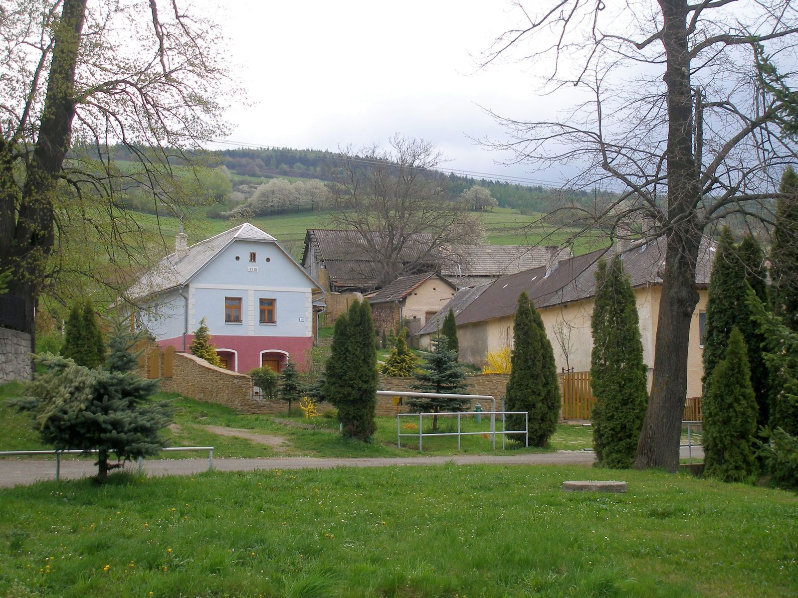 Obec Lipovce okres Prešov región Šariš